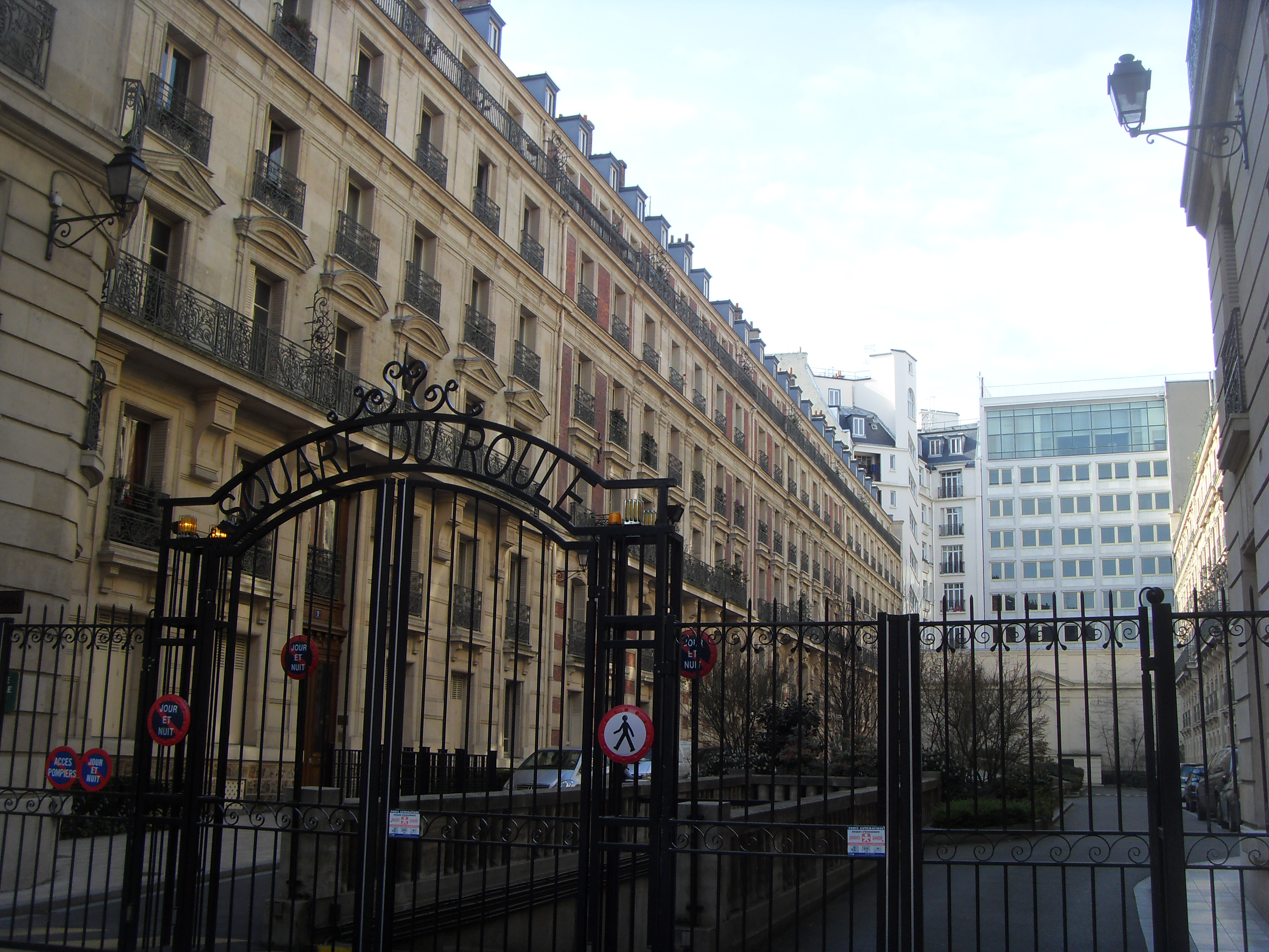 Square du Roule (n°223 rue du Fbg Saint-Honoré) - Paris VIII